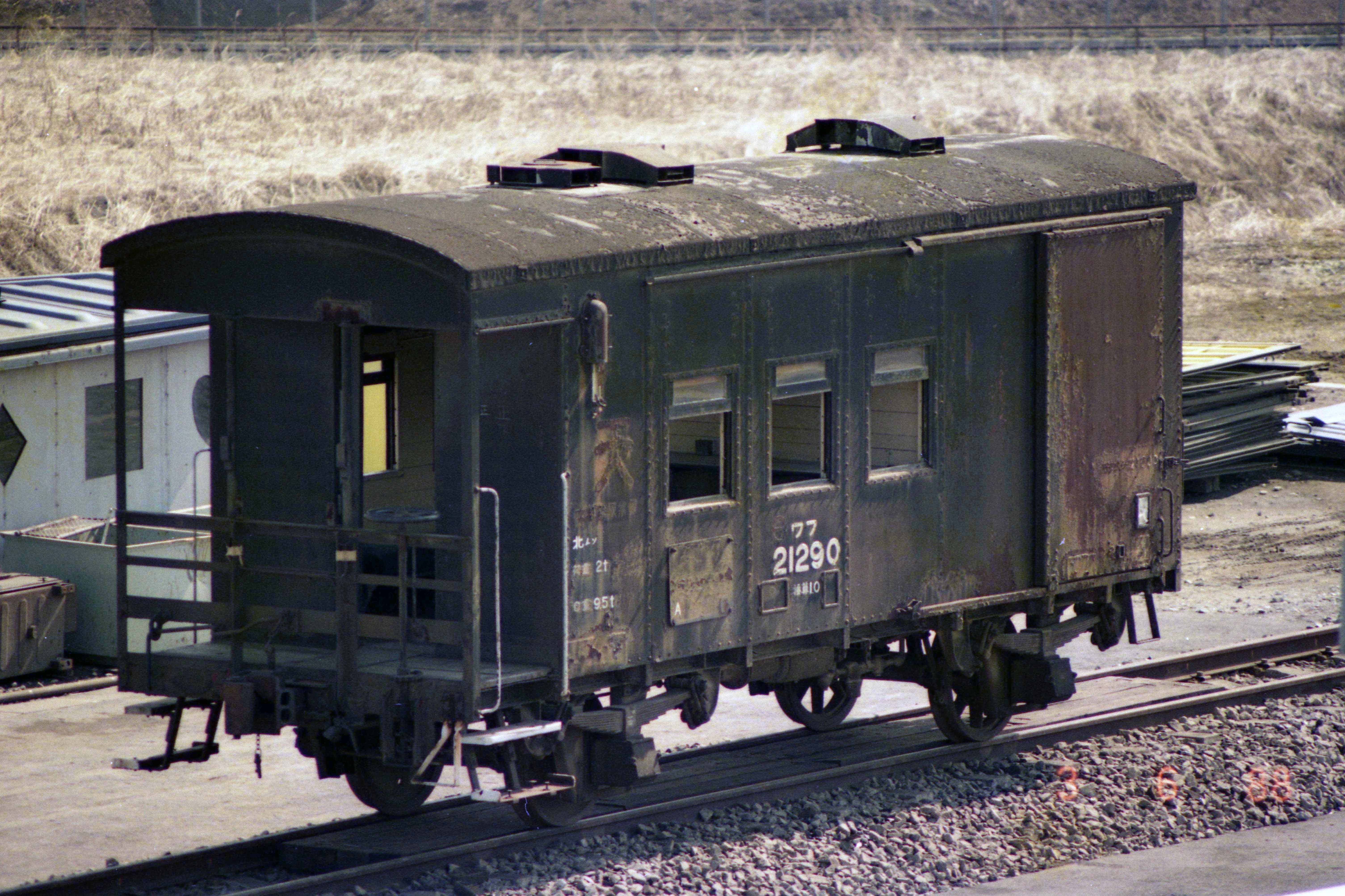 国鉄ワフ21000形有蓋緩急車、ワフ21290